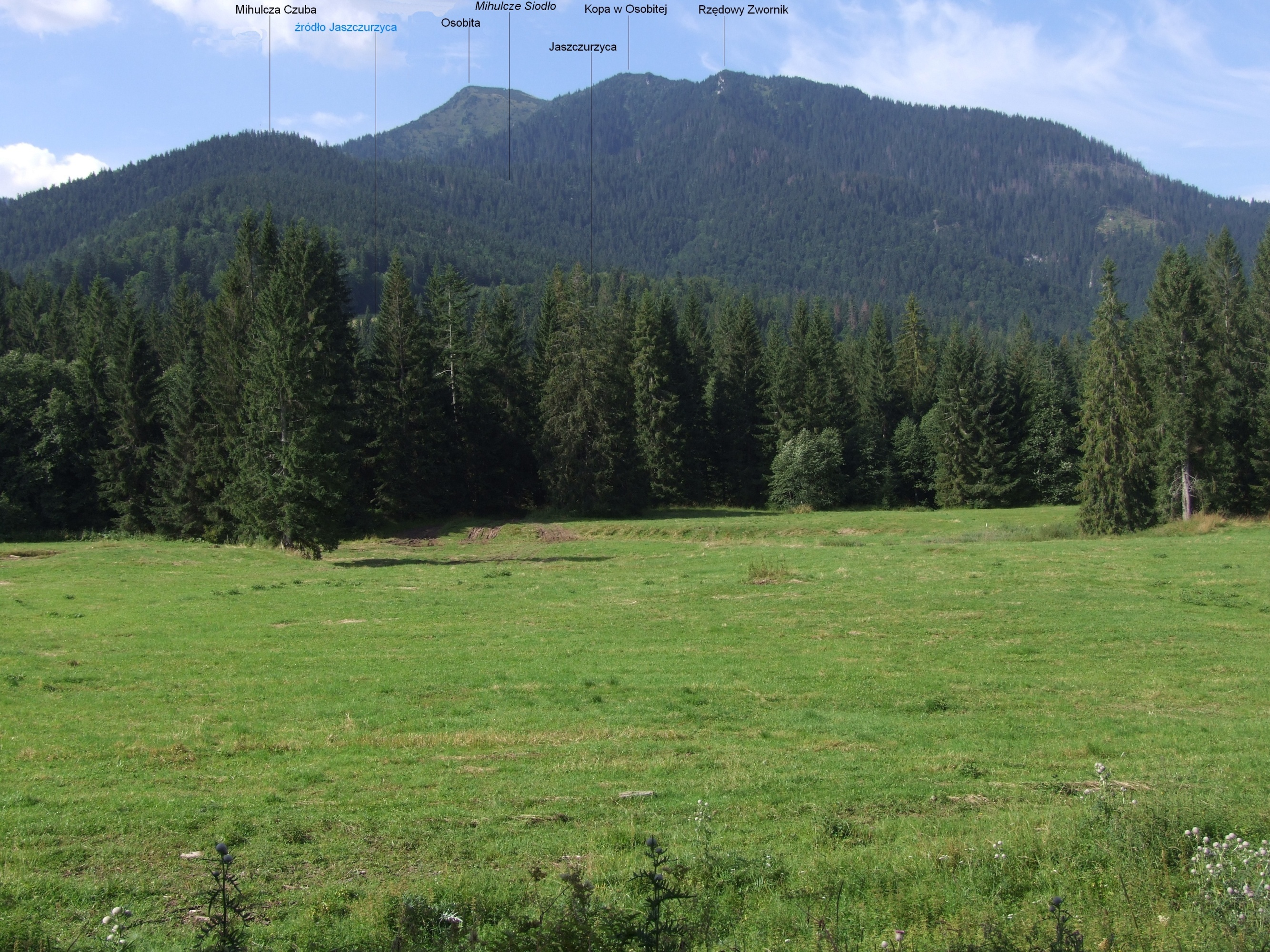 Widok z okolic leśniczówki Bobrovec w dolinie Bobrowieckiej Orawskiej